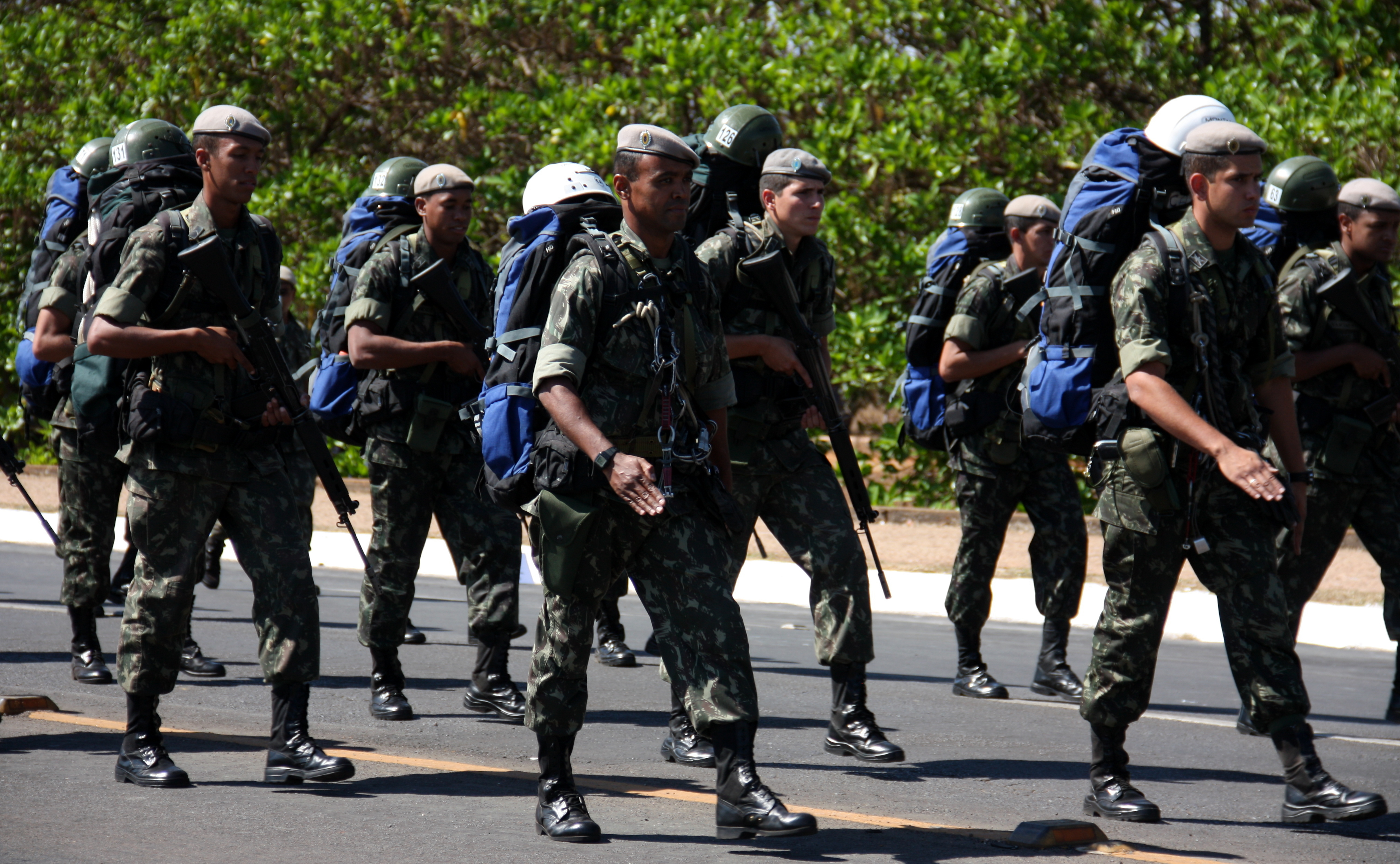 Exército Brasileiro